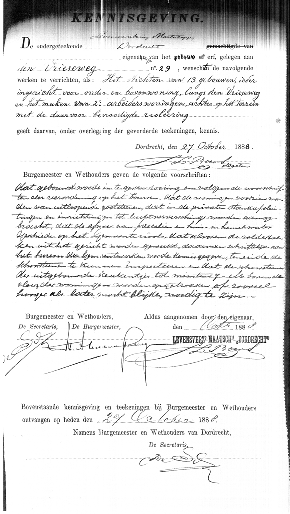 digitale scan van orginele bouwvergunning uit 1888, betreft de Vriesepoortshof uit Dordrecht